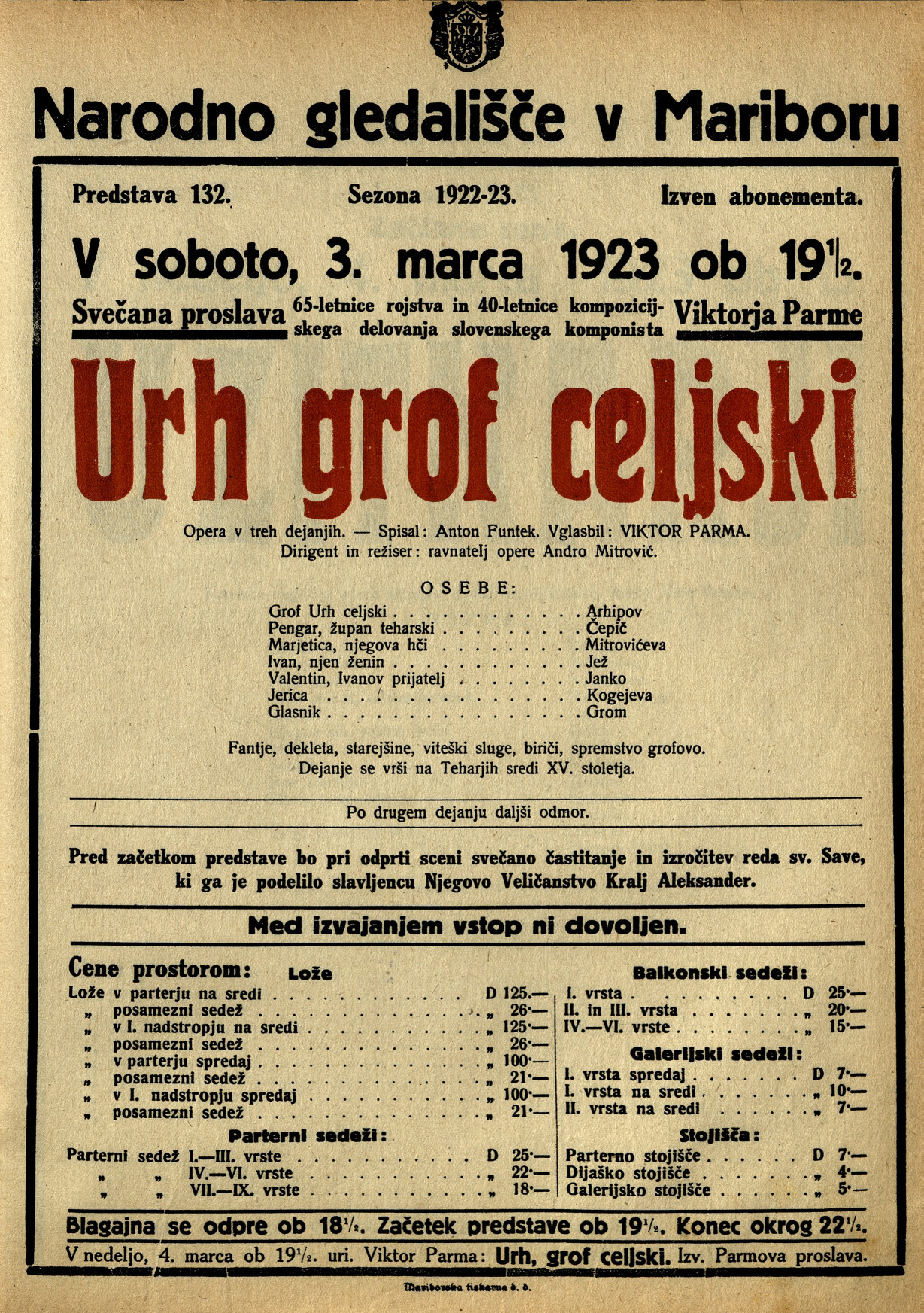 Plakat za predstavo Urh grof celjski v Narodnem gledališču v Mariboru.